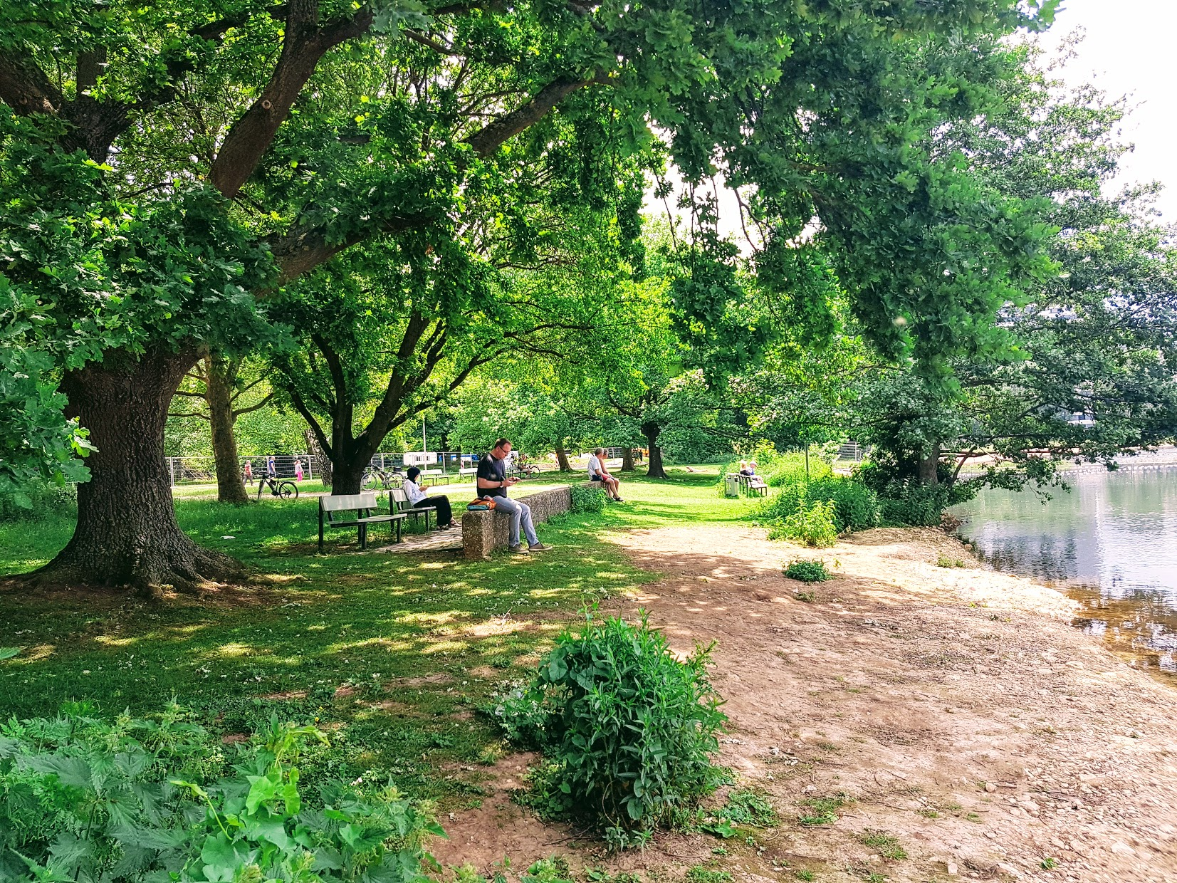 Norikusbucht